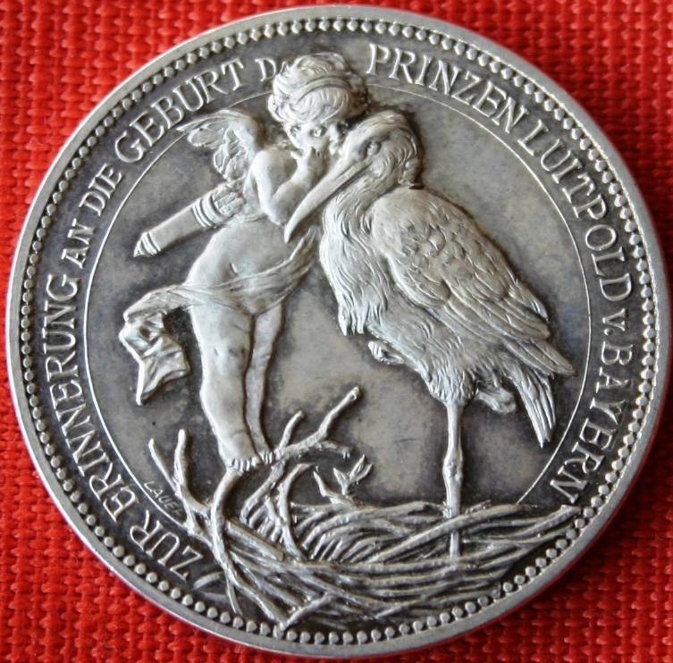 Medaille zur Geburt des Prinzen Luitpold von Bayern